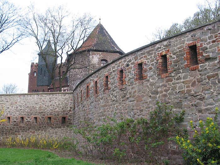 Lukasklause